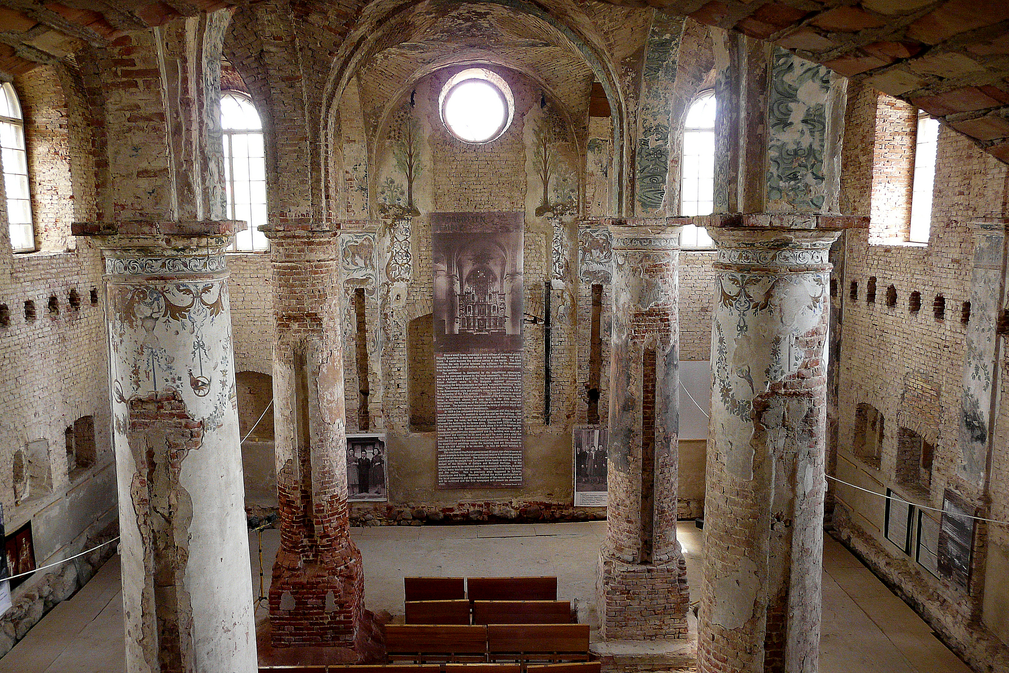 Synagoga, mur., 2 poł. XVIII